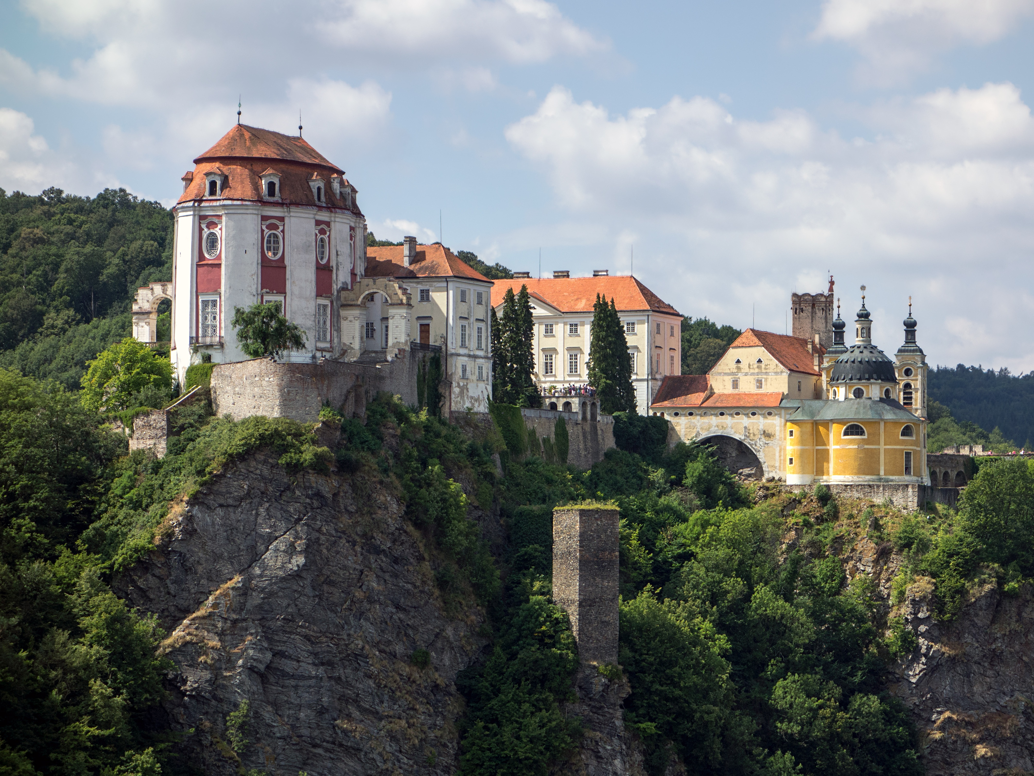 Vranov nad Dyjí, Castle